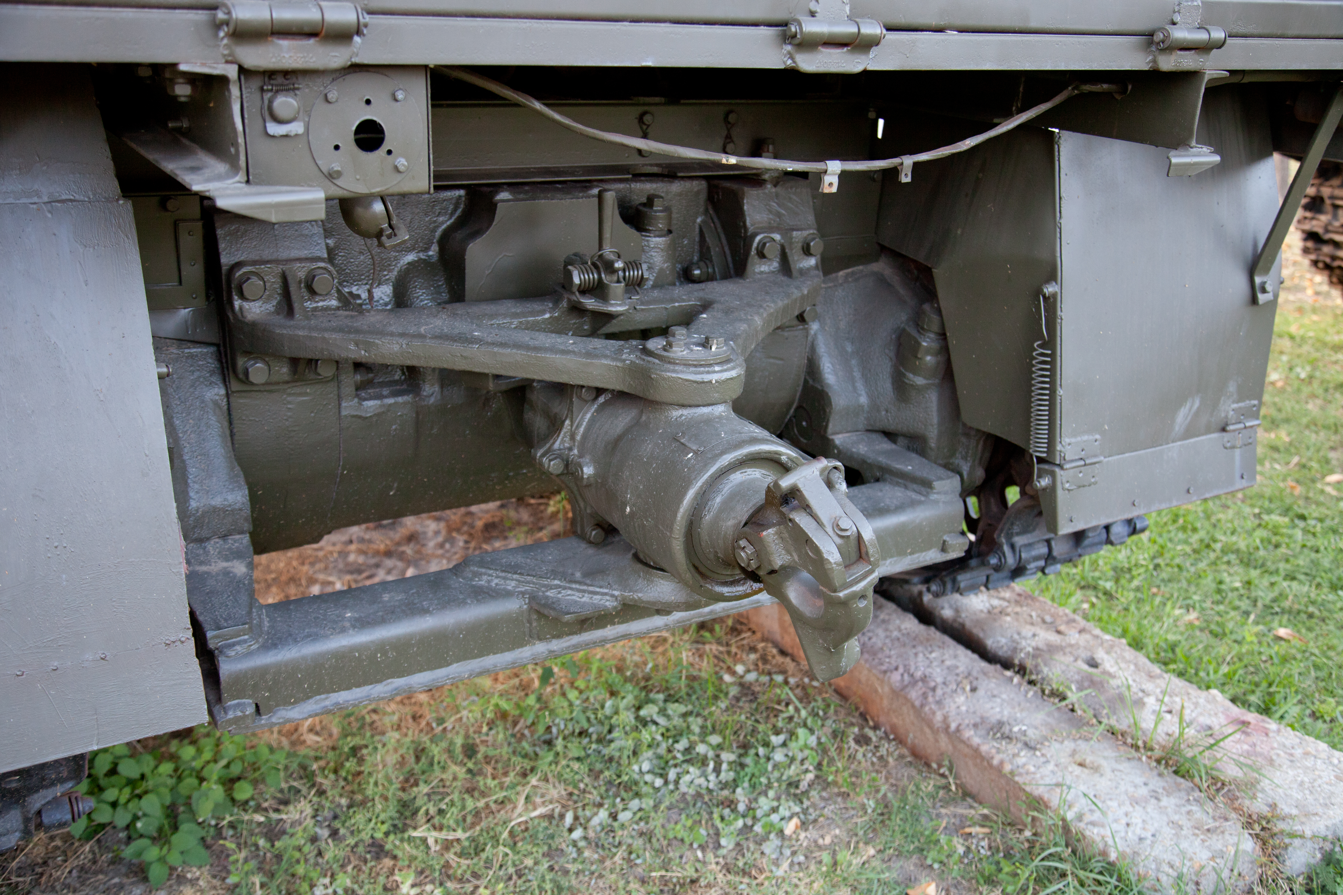 Sofia; der "Frauenmarkt" (Schenski pasar)